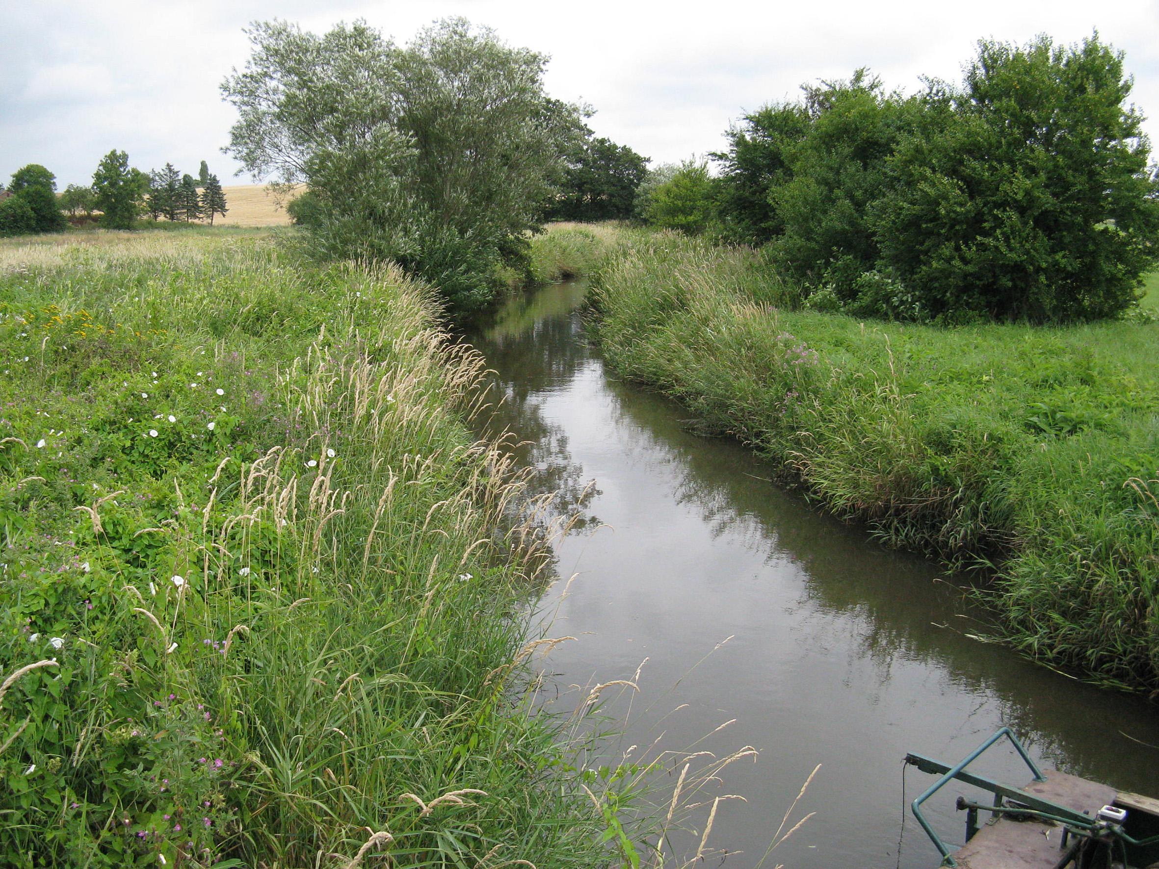 Odder Å ved Assedrup